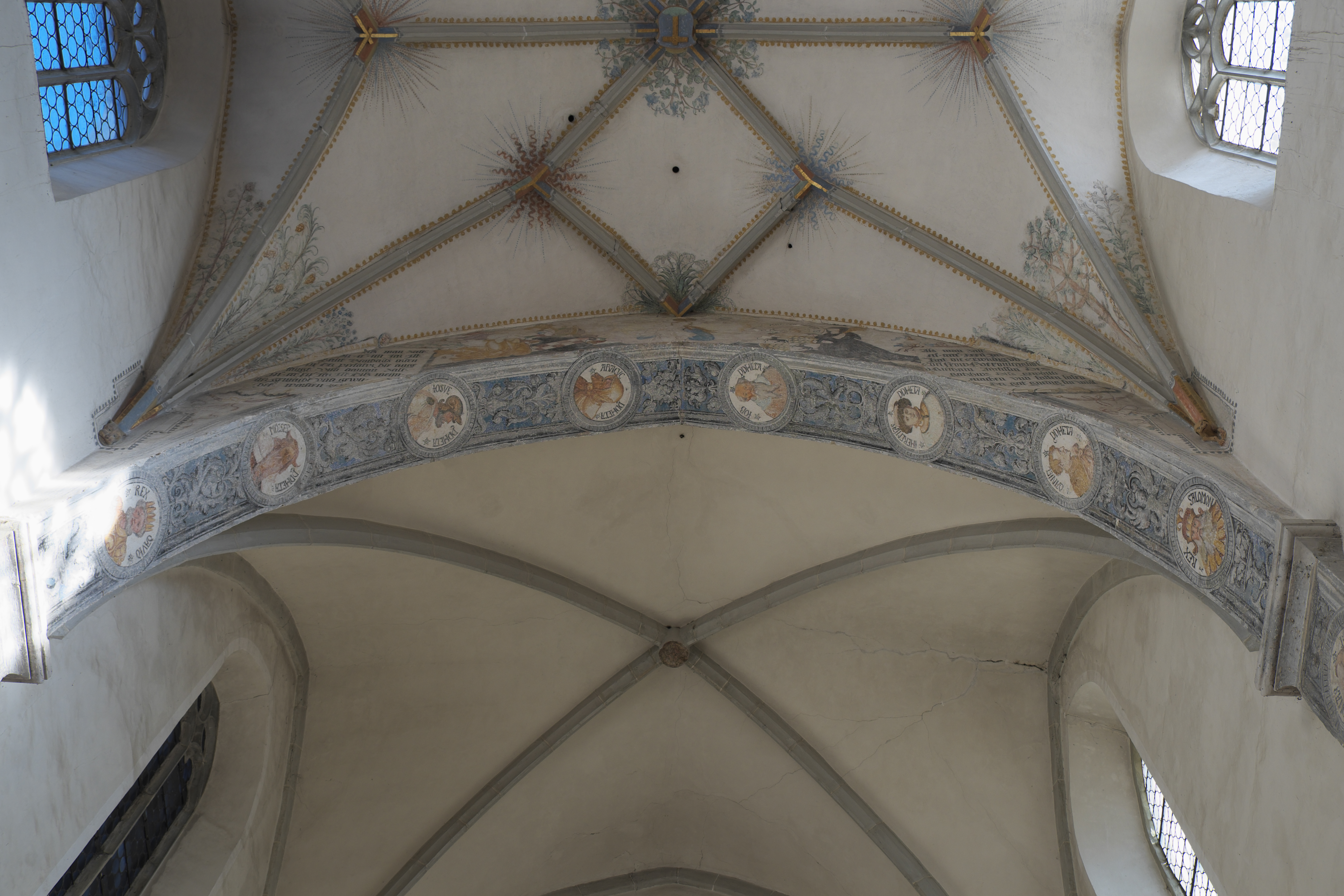 Katholische Pfarrkirche St. Anna, ehemalige Kirche des Zisterzienserinnenklosters, in Heiligkreuztal (Altheim) im Landkreis Biberach (Baden-Württemberg/Deutschland), Fresken aus der ersten Hälfte des 16. Jahrhunderts